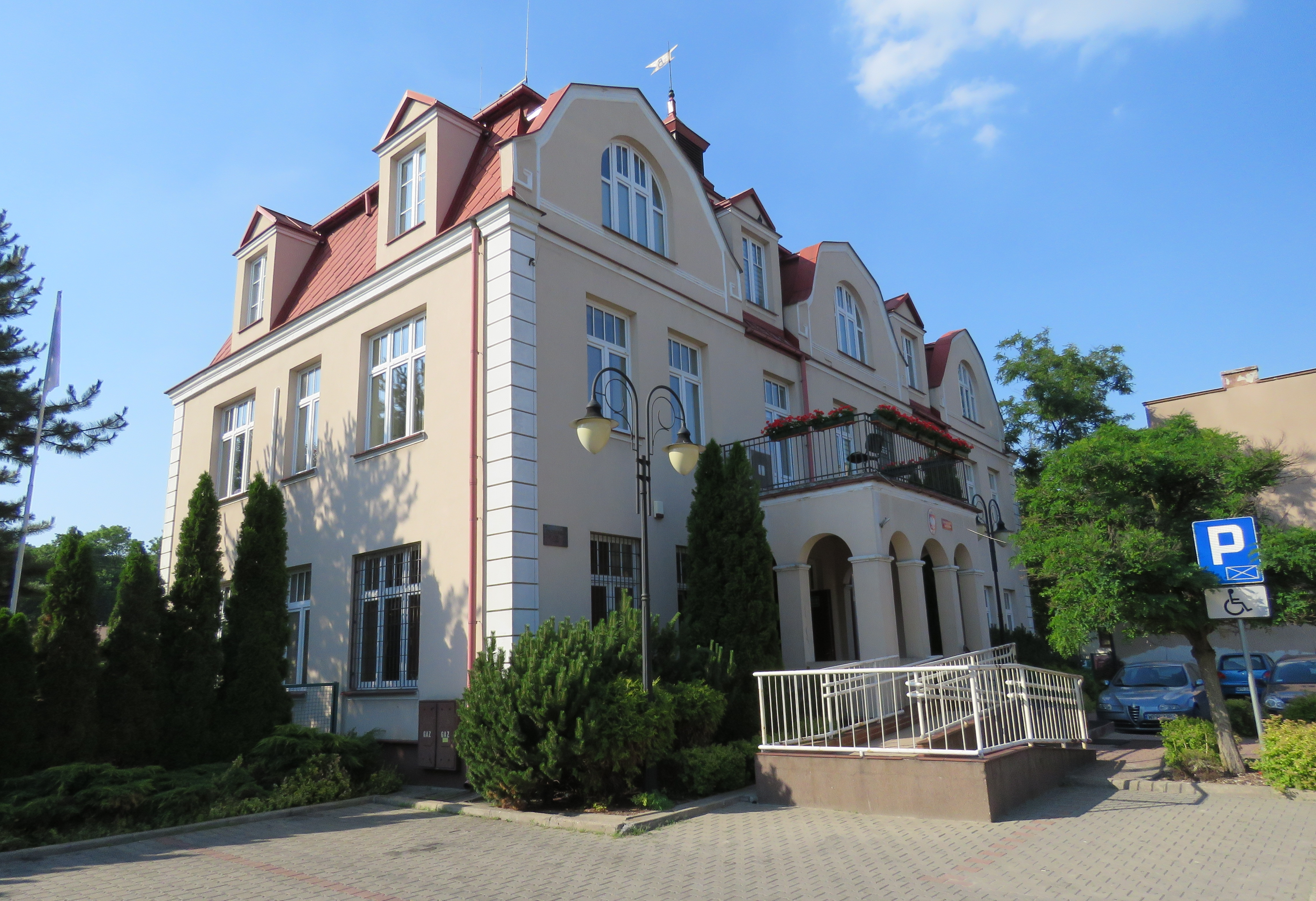 Urząd Miasta i Gminy Brwinów